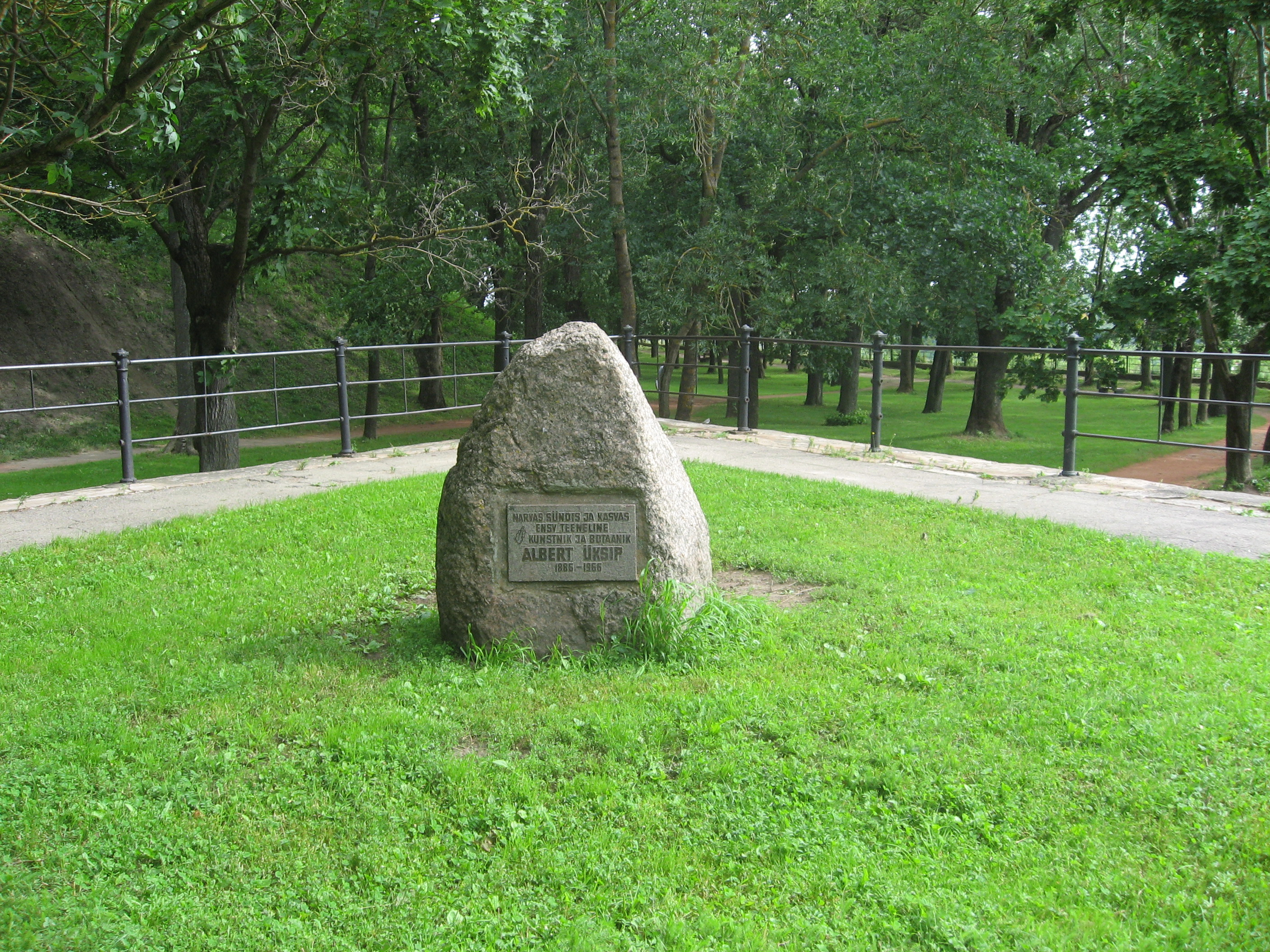 Narva, památník Albertu Üksipovi